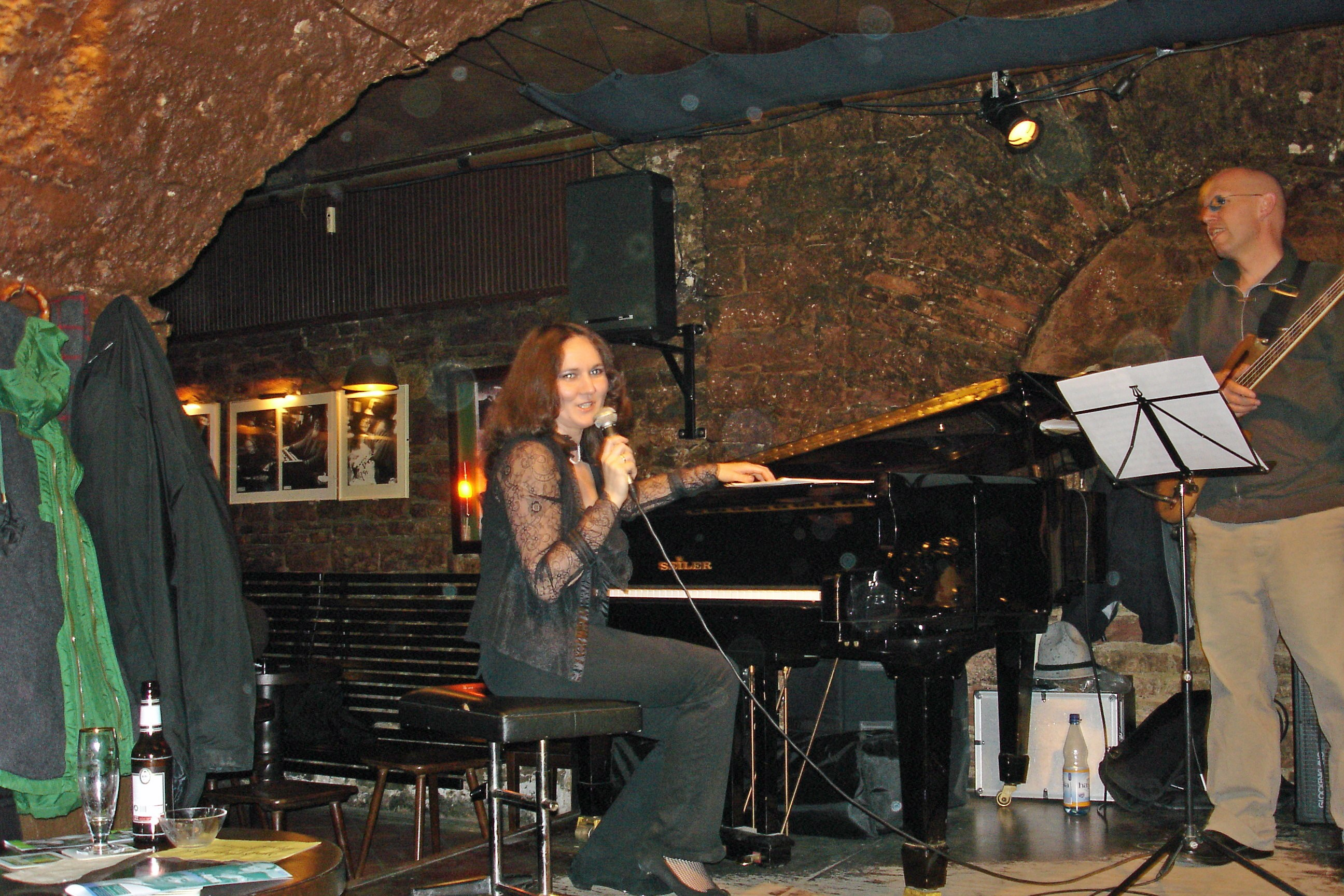 Jazzkeller, Frankfurt am Main, "Natalia Karmazin Trio", Natalia Karmazin mit Thomas Heidepriem (rechts)